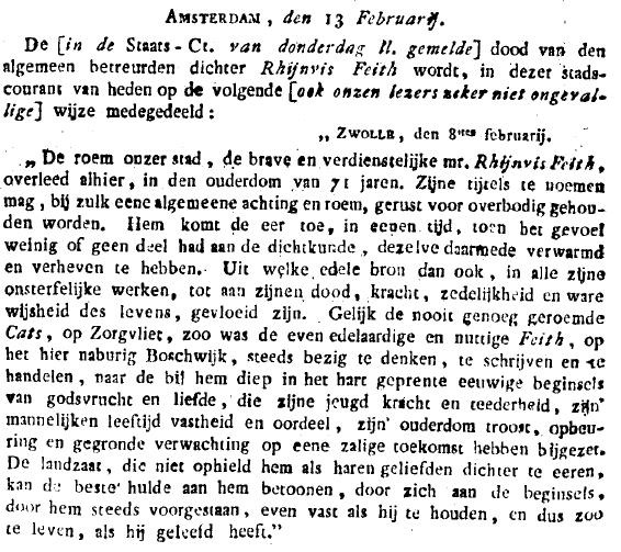 Overlijdensbericht van Rhijnvis Feith in de Staatscourant van 14 februari 1824.